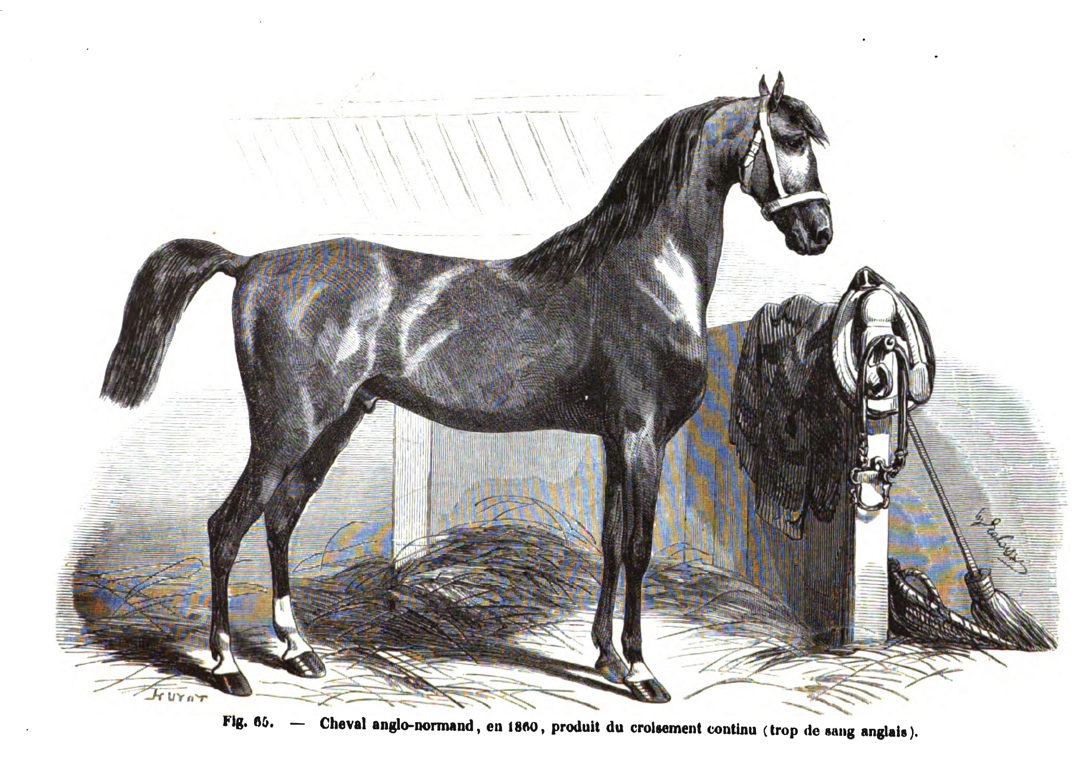 Anglo-Norman